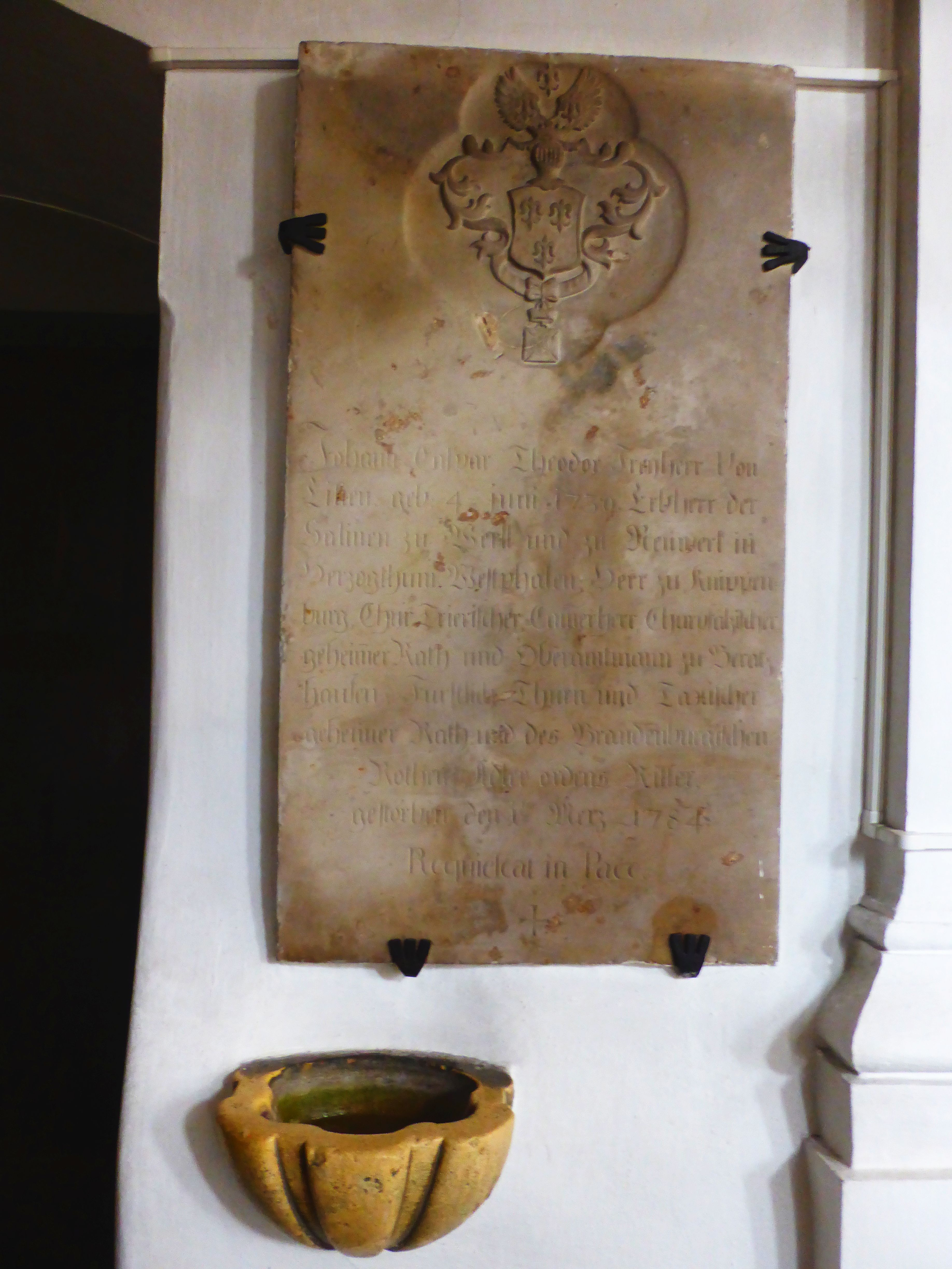 Epitaph der Familie von Lilien in der Pfarrkirche St. Peter und Paul in Beratzhausen